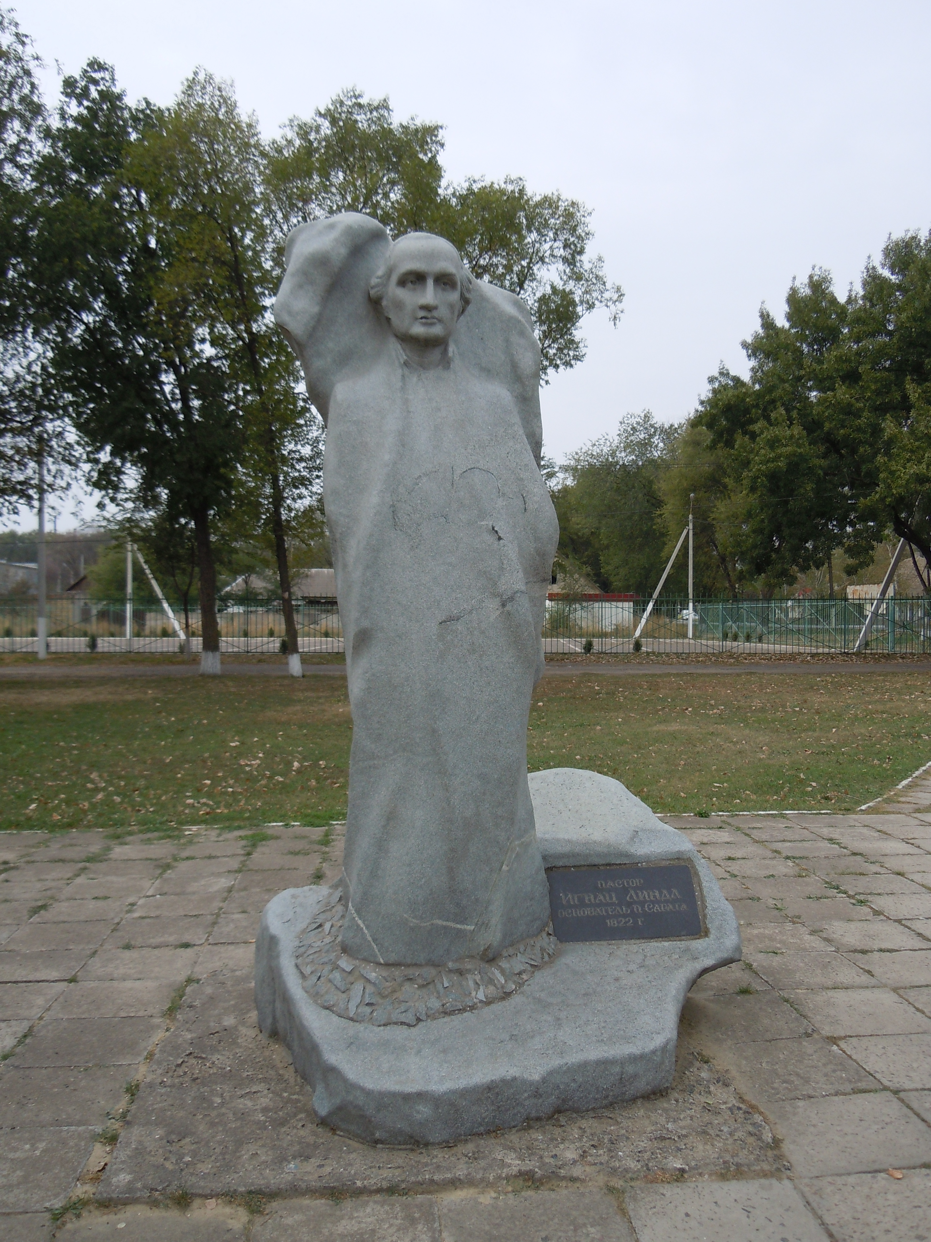 Монумент Іґнацу Ліндлю в смт Сарата, Одеська область